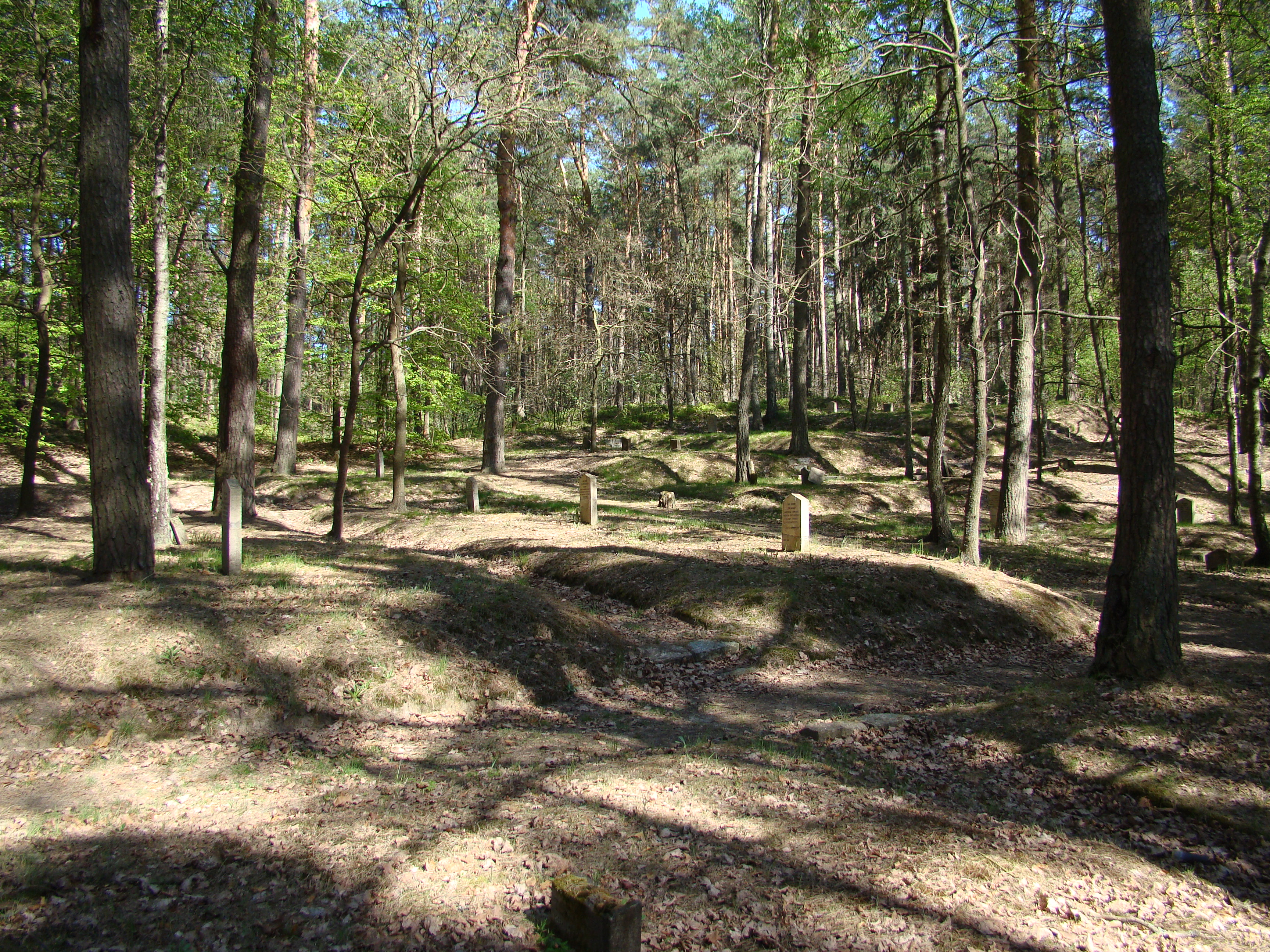 Lidzbark Warmiński - Markajmy - cmentarz jeniecki z okresu I Wojny Światowej (zabytek nr A-1804 z 12.01.1987 i A-3740/O z 10.01.1987)